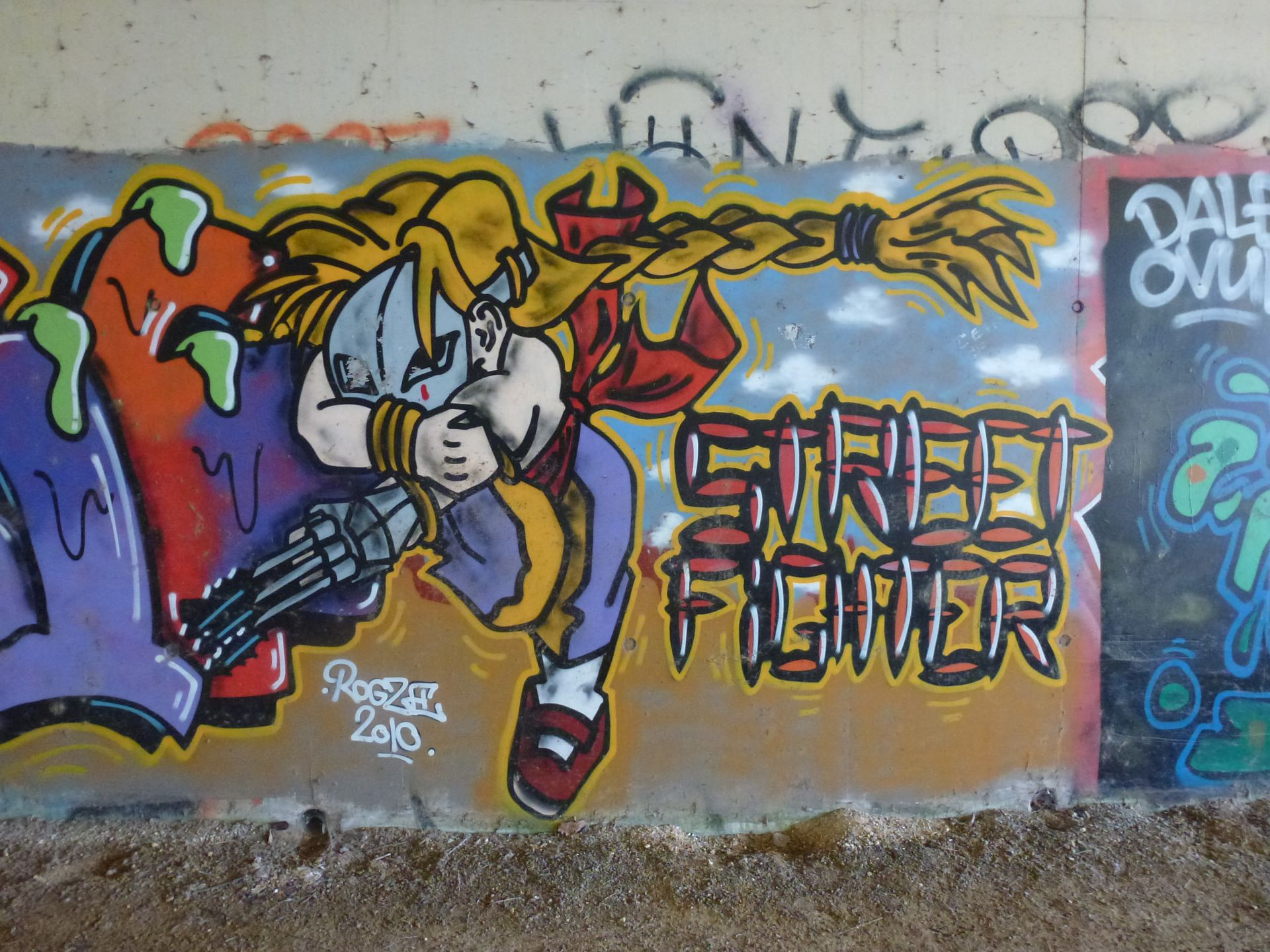 Street art sous le pont du TGV passant au-dessus de la Marsange, à Presles-en-Brie (5)